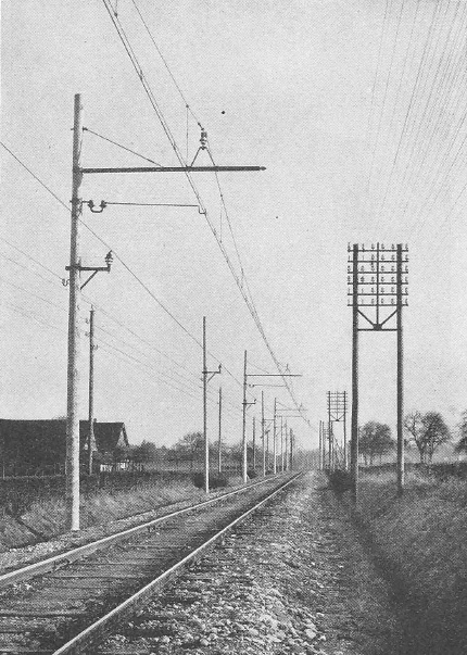 Versuchsbetrieb Seebach-Wettingen: Parallelführung von Ruten- und Bügelleitung